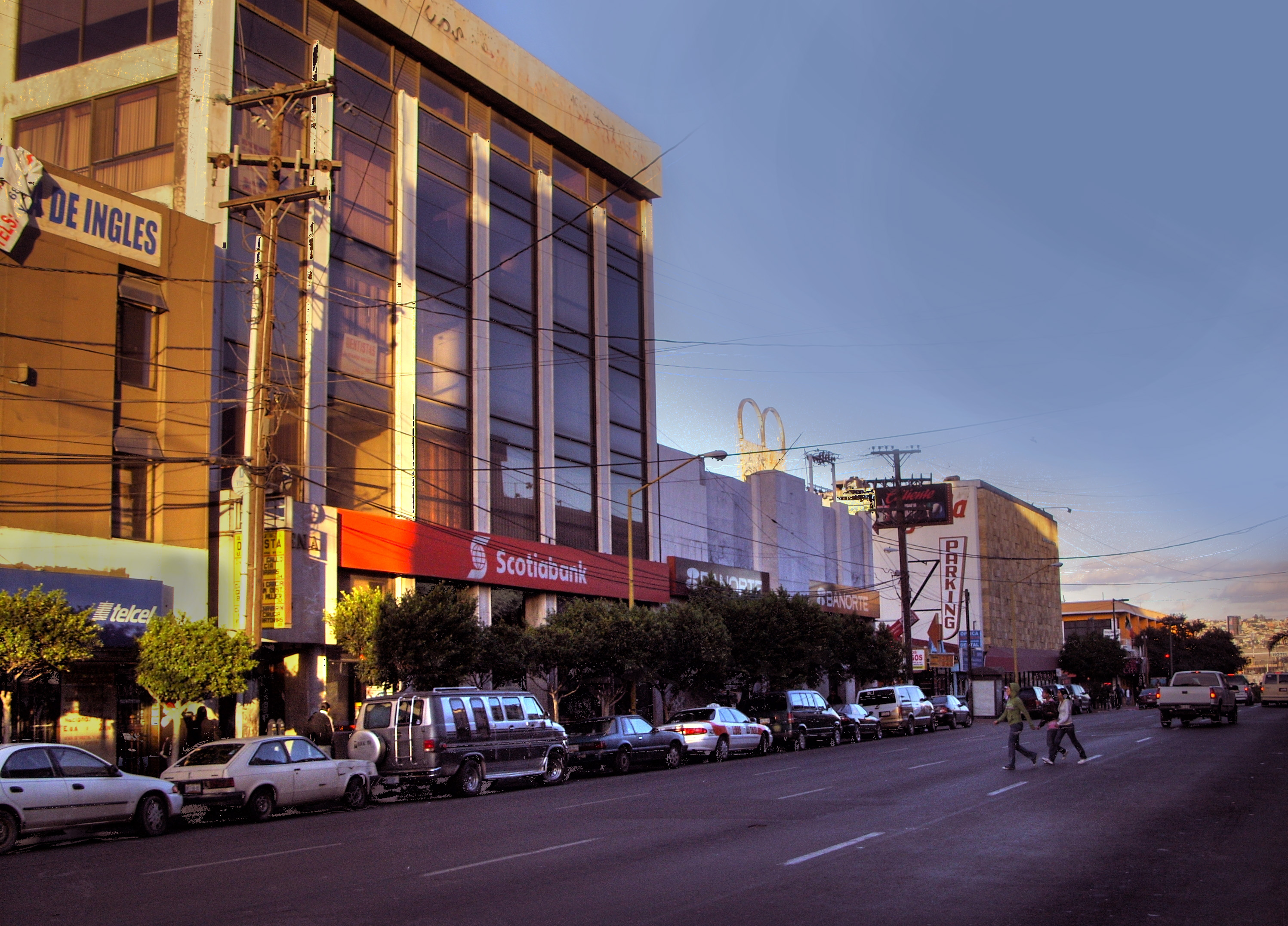 4ta entre Constitucion y Revolucion